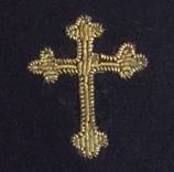 Distintivo del Cuerpo Eclesiástico de la Armada española